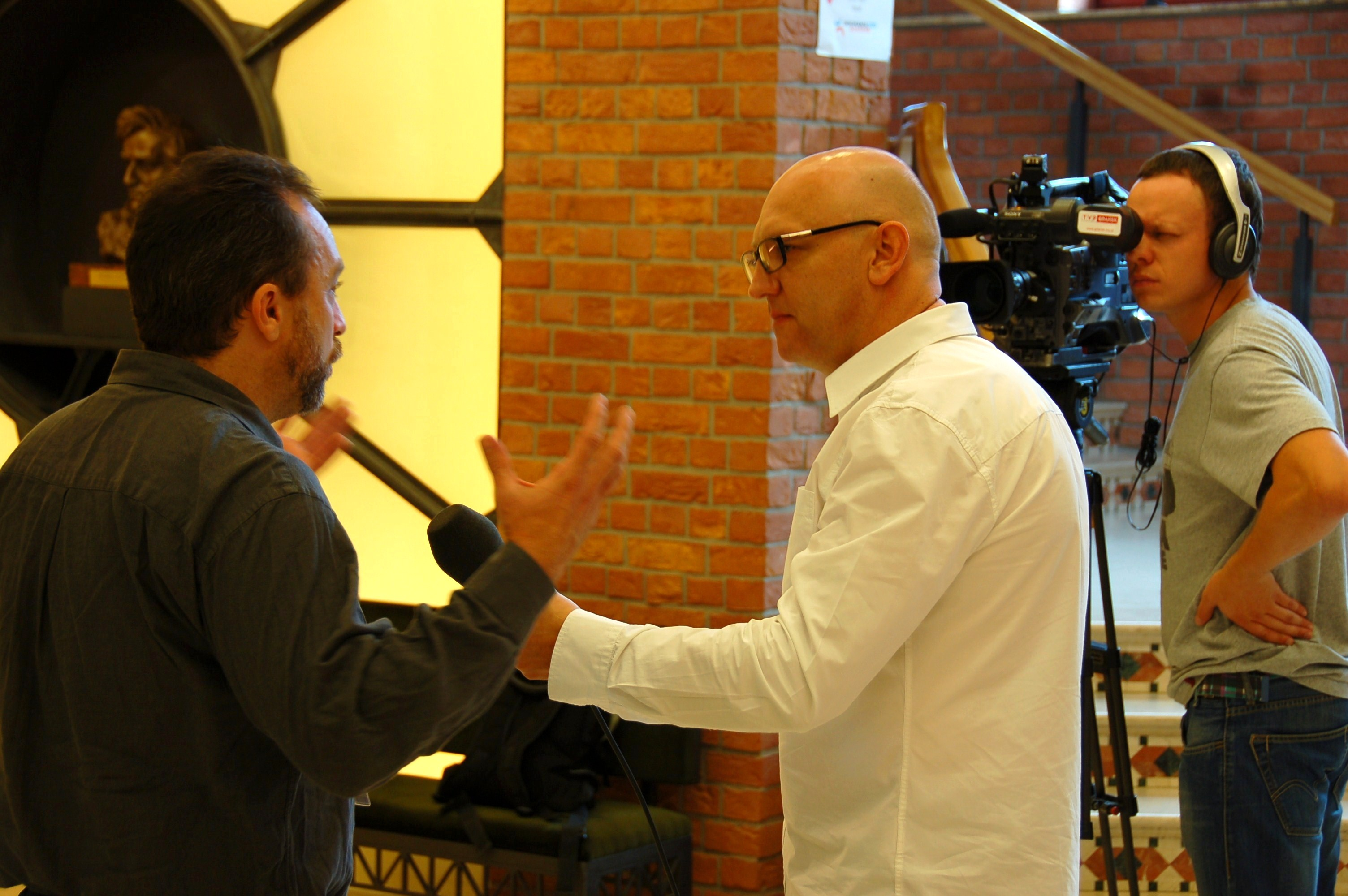 Jimmy Wales (po lewej) i Marek Wałuszko, gdański dziennikarz (w środku), Wikimania Gdańsk 2010.